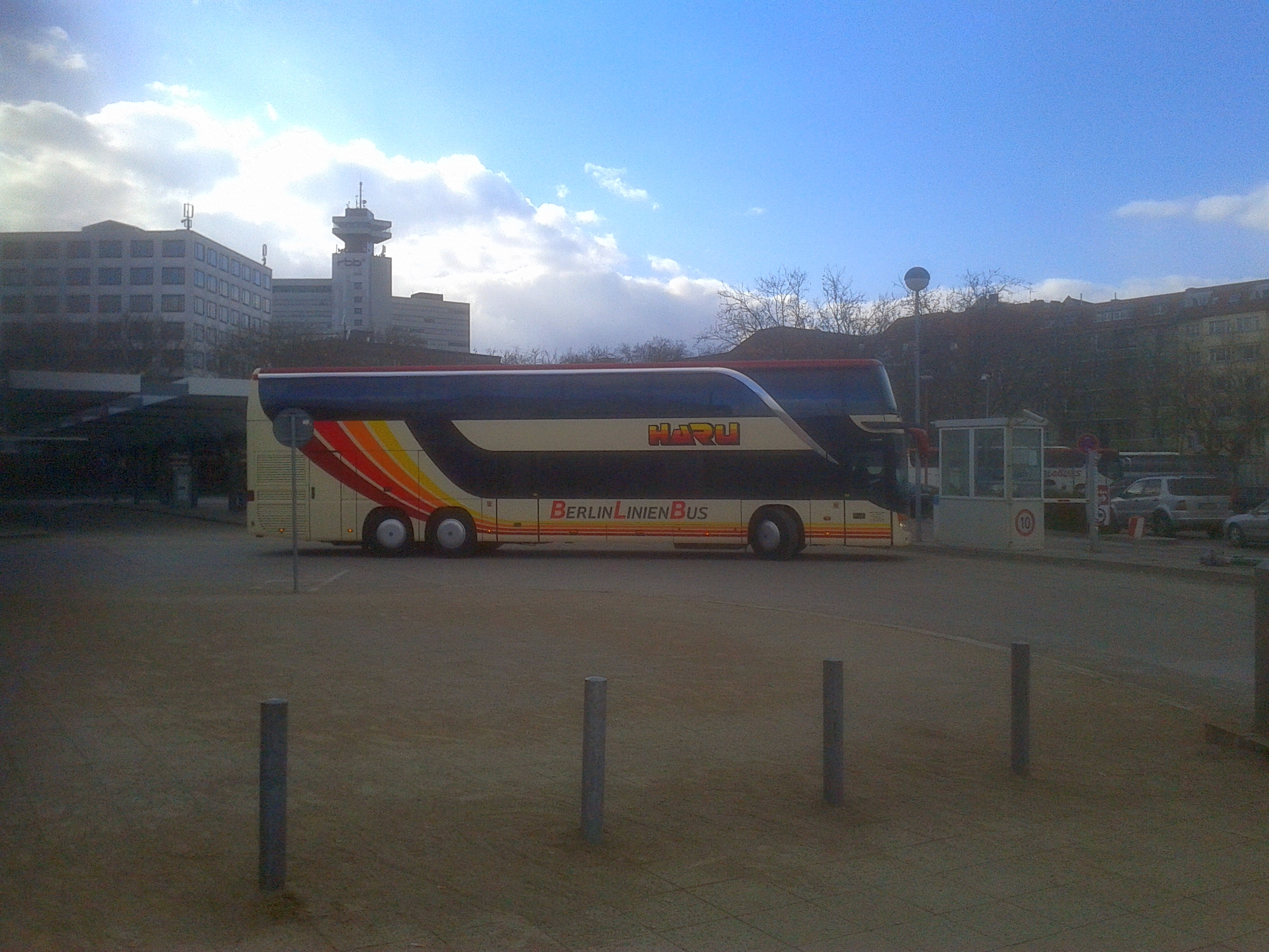 Ein Bus des Spandauer Unternehmens Haru verläßt auf der BerlinLinienBus-Linie Berlin-Hamburg den ZOB Berlin.